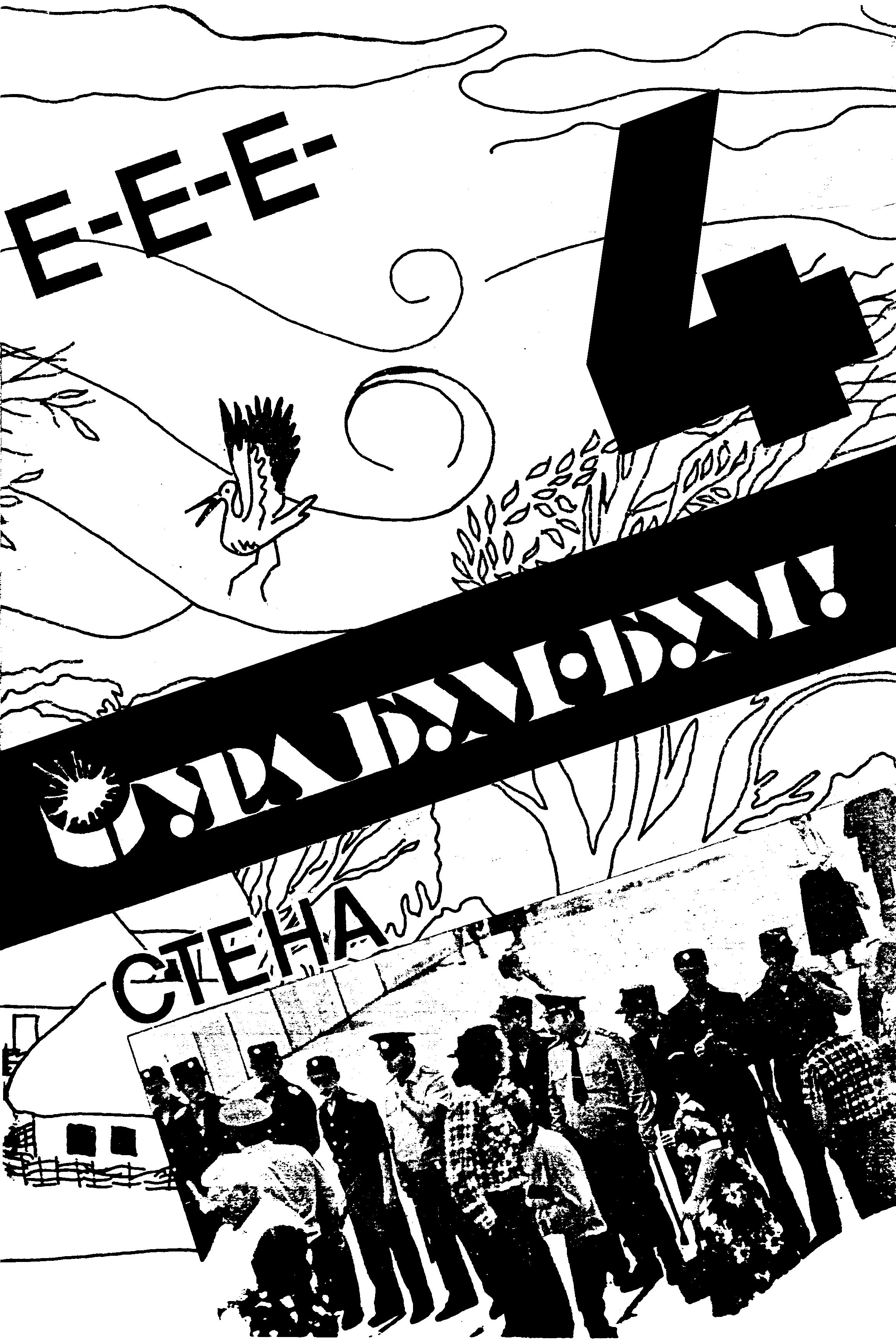 Обложка журнала Ура Бум-Бум! № 4 (Ростов-на-Дону)